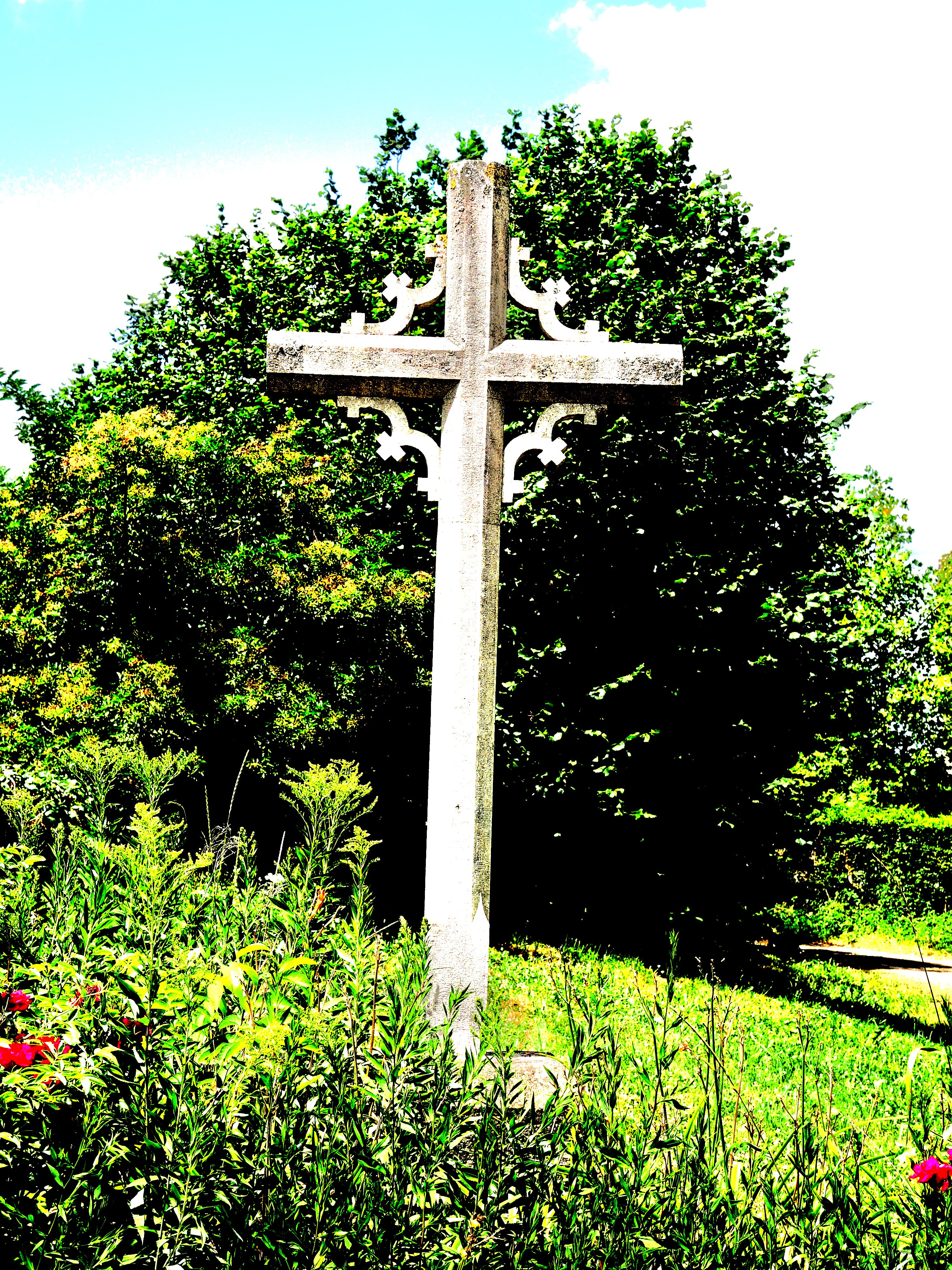 Croix de village.